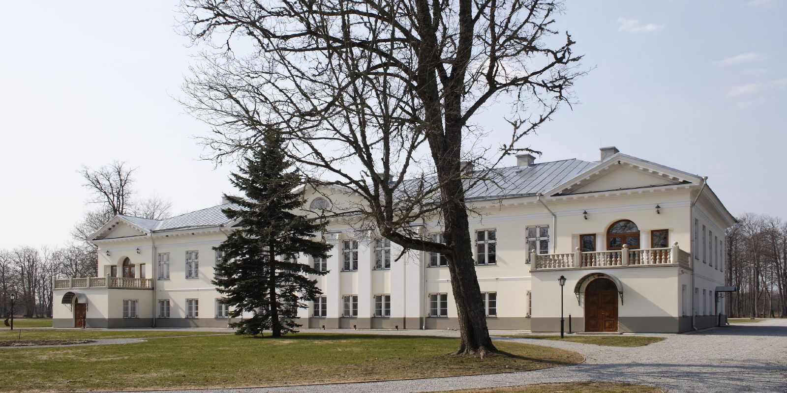 Vihterpalu mõisahoone